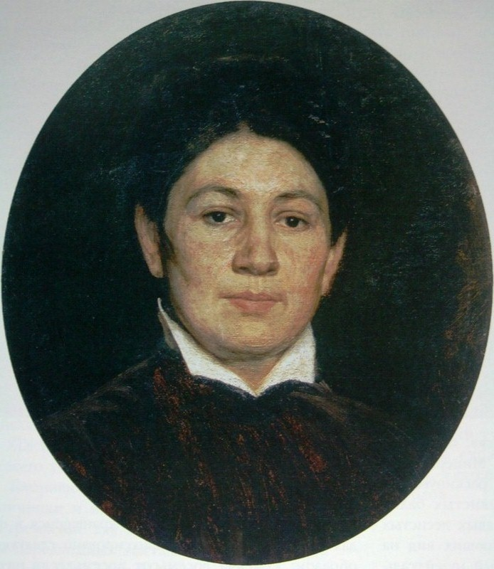 Ярошенко Николай "Портрет М.П.Ярошенко, жены художника" 1880-е Холст, масло 44х36 Мемориальный музей-усадьба Н.А.Ярошенко, Кисловодск